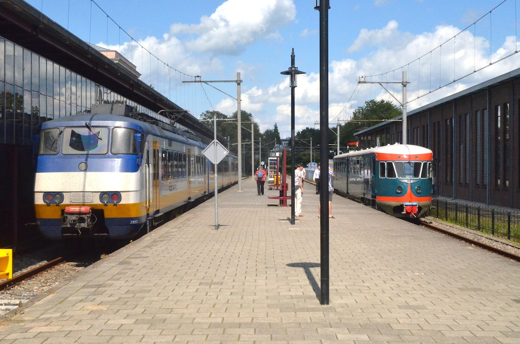 Nederlands Spoorwegmuseum Pendeldienst. Foto: Erik Swierstra.